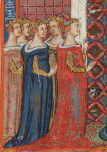 Dcery Karla II. z Anjou